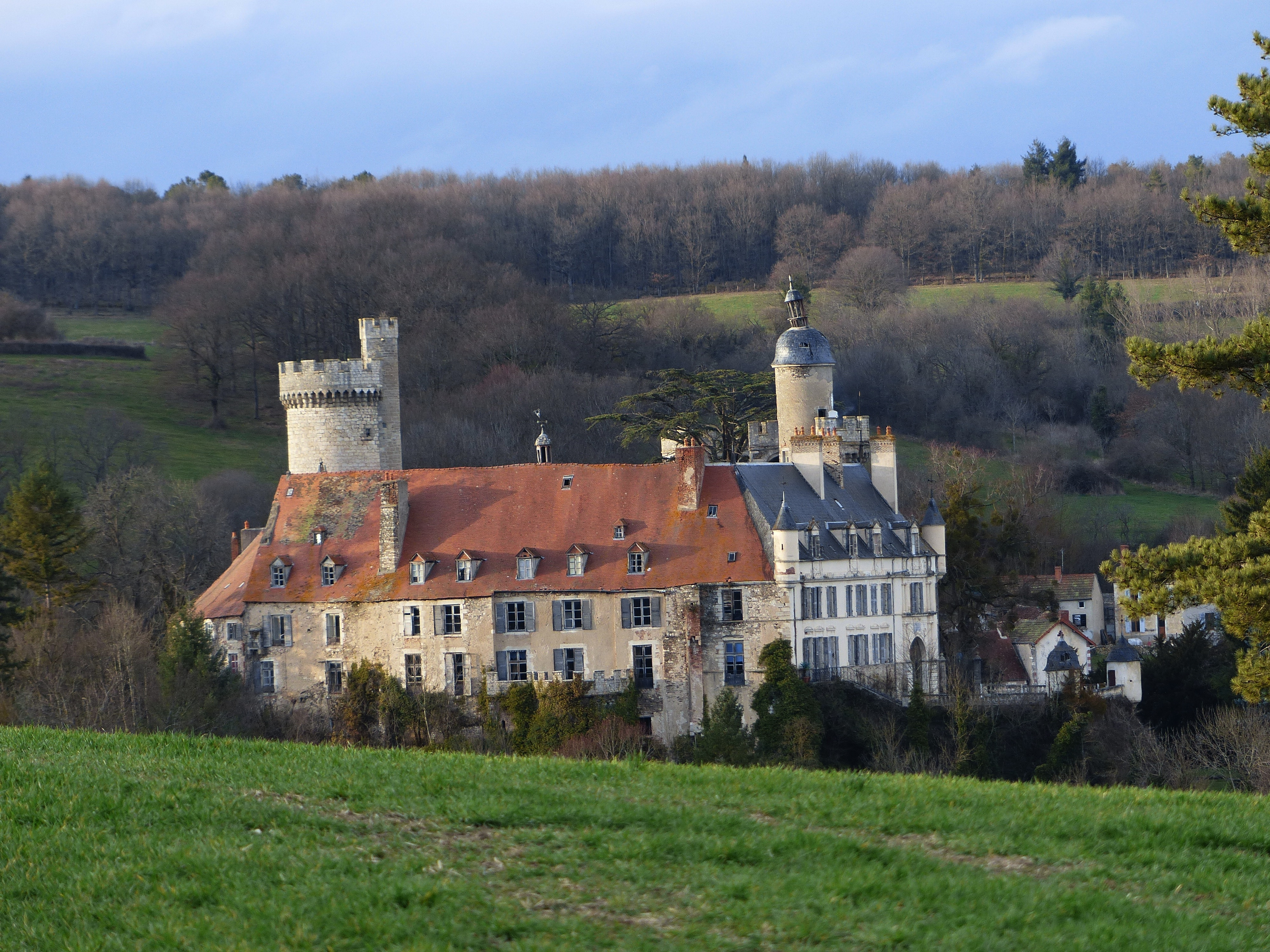 Veauce (Allier). Façade sud du château, vue des hauteurs de Sussat, près du lieu-dit La Chassagne (par-dessus le vallon de la Veauce)